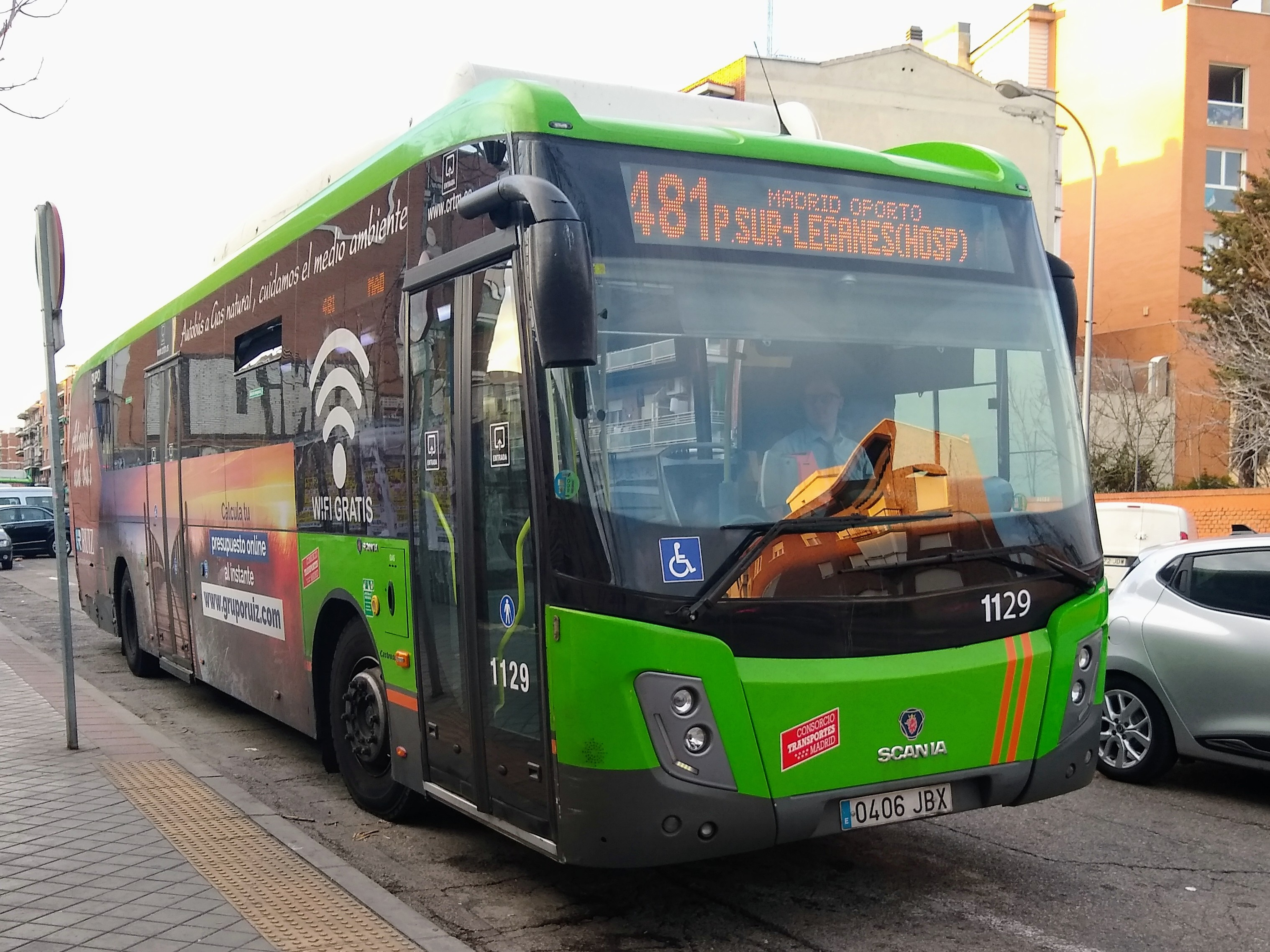 Autobús interurbano de Madrid